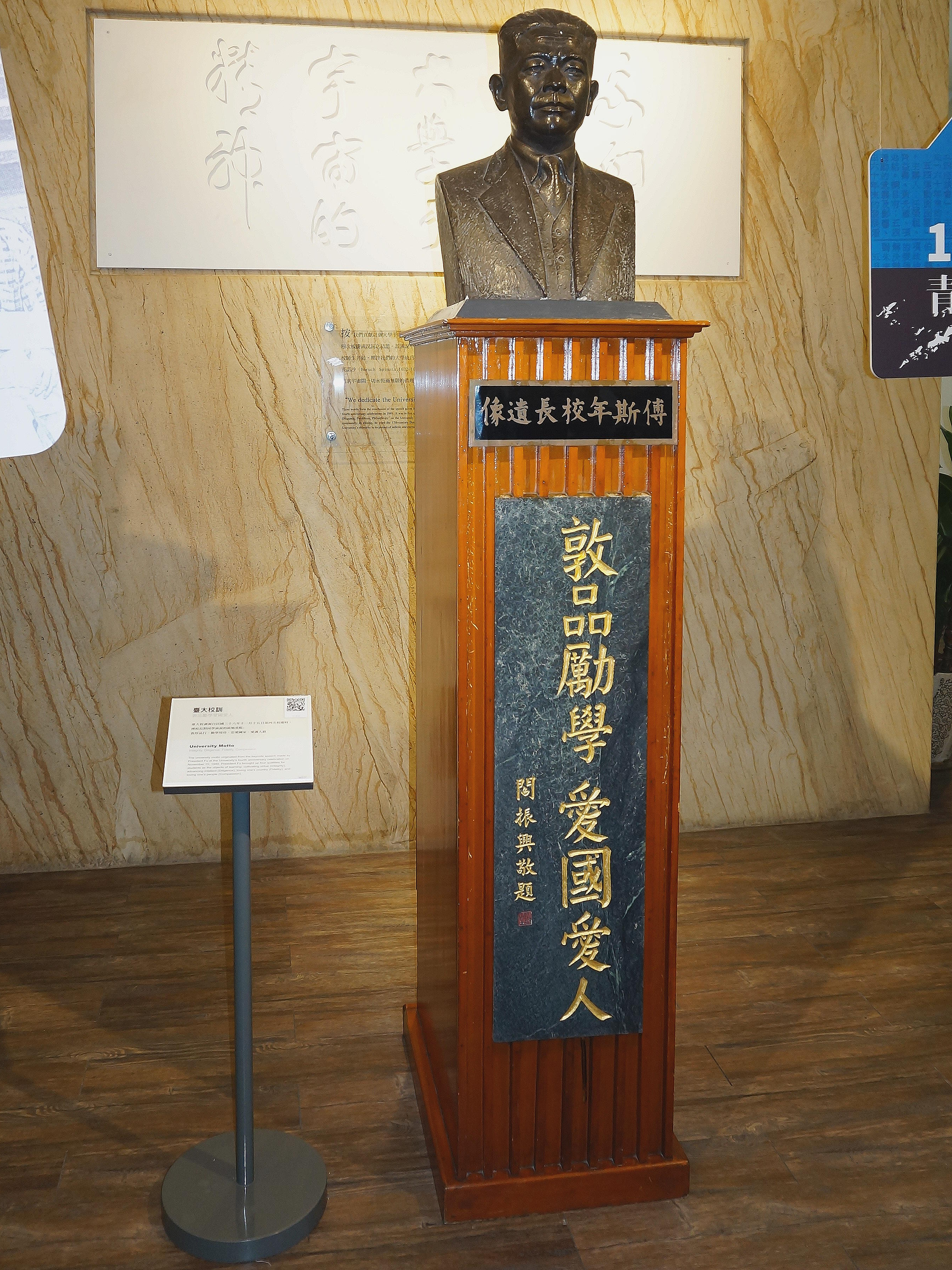 中文（台灣）: 國立臺灣大學校史館2樓大廳，國立臺灣大學校訓解說牌（左）與傅斯年胸像（右）。傅斯年胸像正面銘板刻國立臺灣大學校訓，閻振興題字。